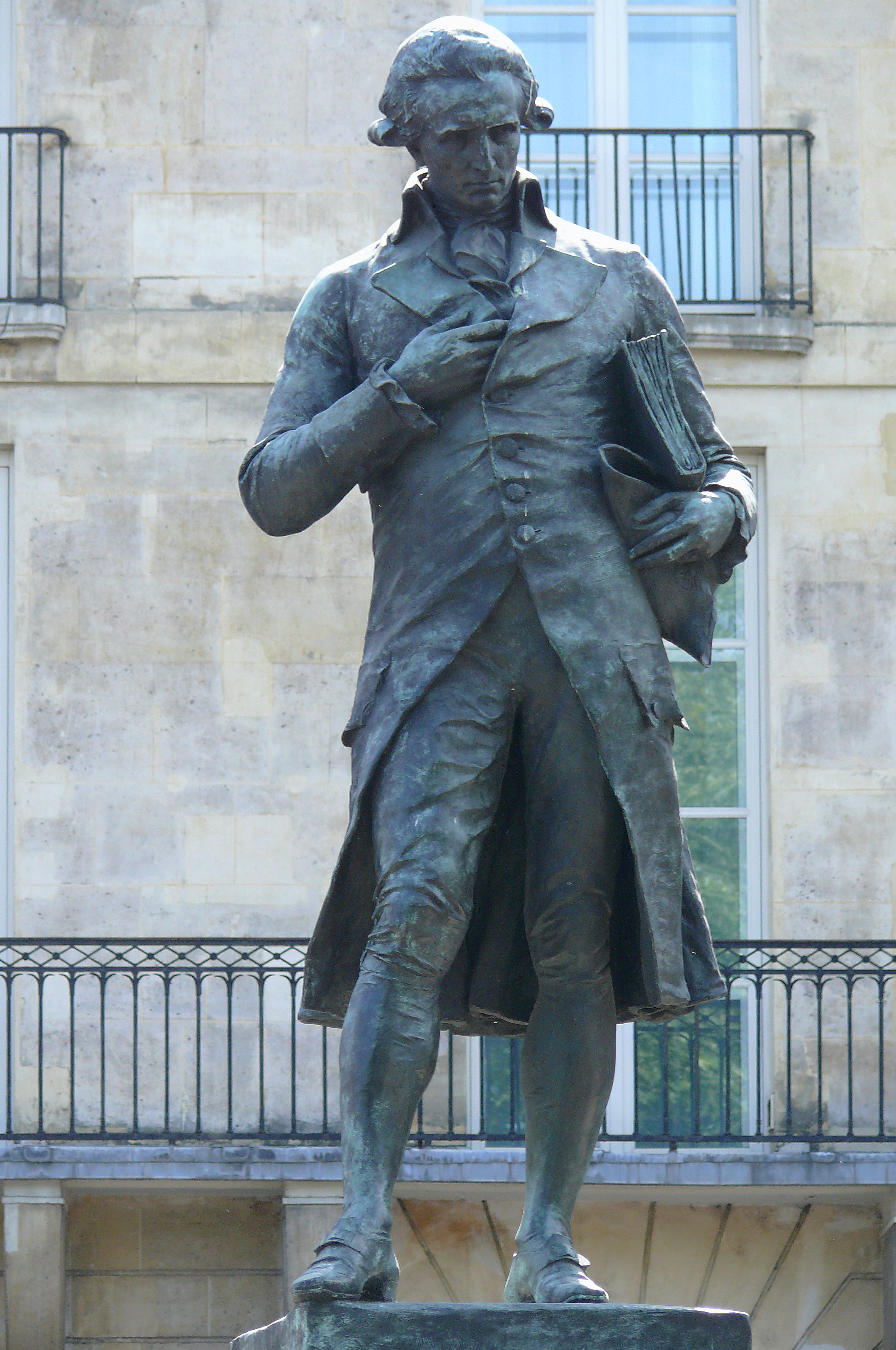 Paris 6ème arrondissements - Statue de Condorcet sur le quai Conti